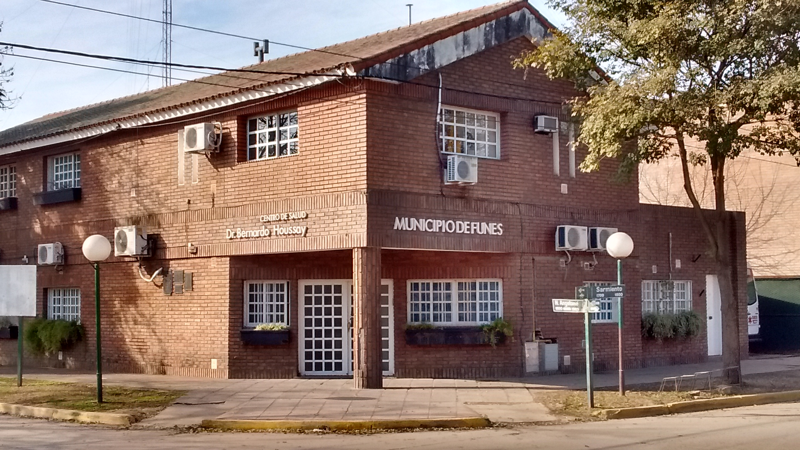 Centro de Salud Doctor Bernardo Houssay